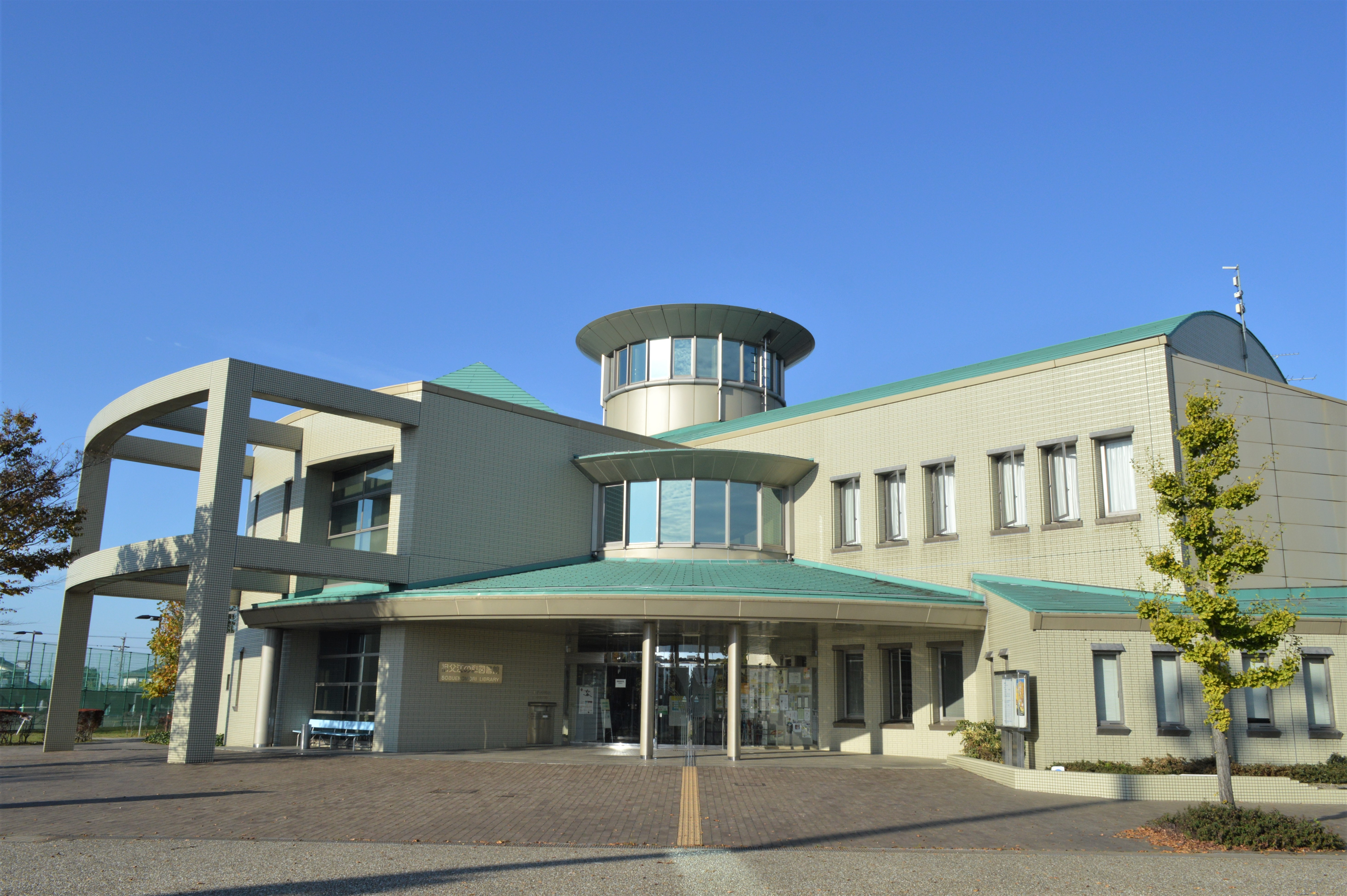 稲沢市立祖父江の森図書館。